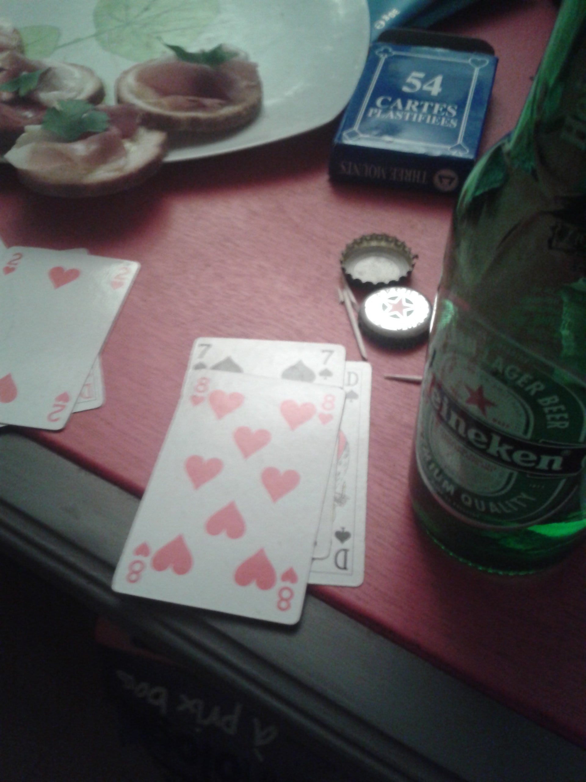 Illustration du coup de maître au sept et demie